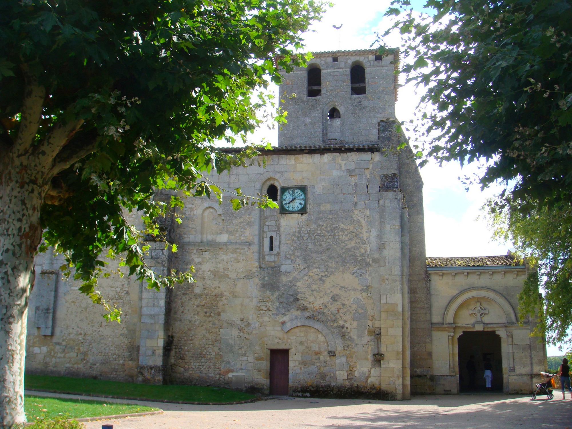 église Saint-Martin de Fronsac, en Gironde